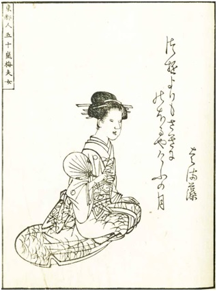 『萬家人名録』（文化十年刊）の浜藻肖像